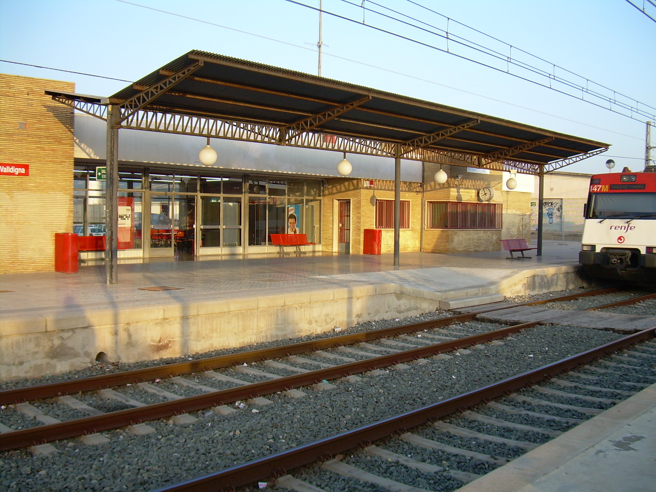 Estación de Tabernes de Valldigna.